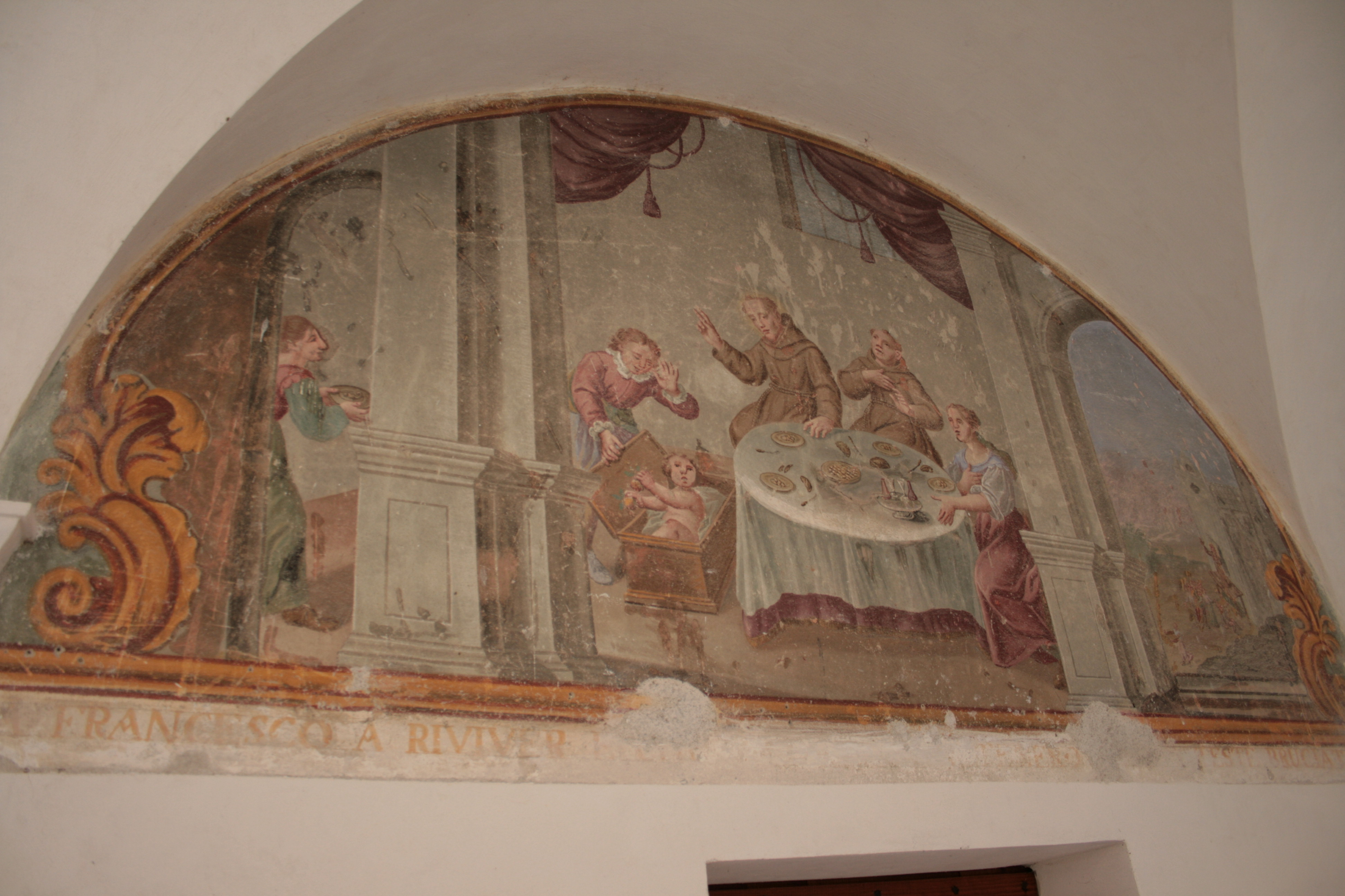 Saorge, Alpes-Maritimes, France. Le monastère franciscain, cloître. Fresques des lunettes du cloître : St François ressuscite un enfant.